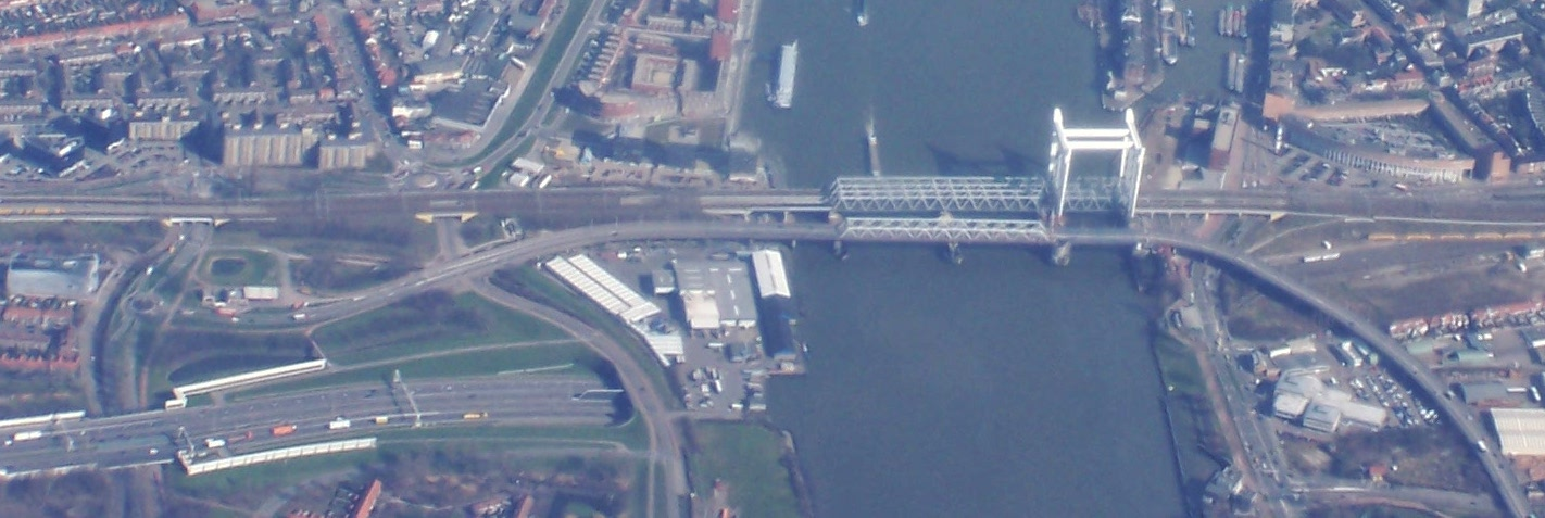 Noordelijke ingang Drechttunnel. Dordrecht vanuit de lucht. Links Zwijndrecht, rechts Dordrecht.